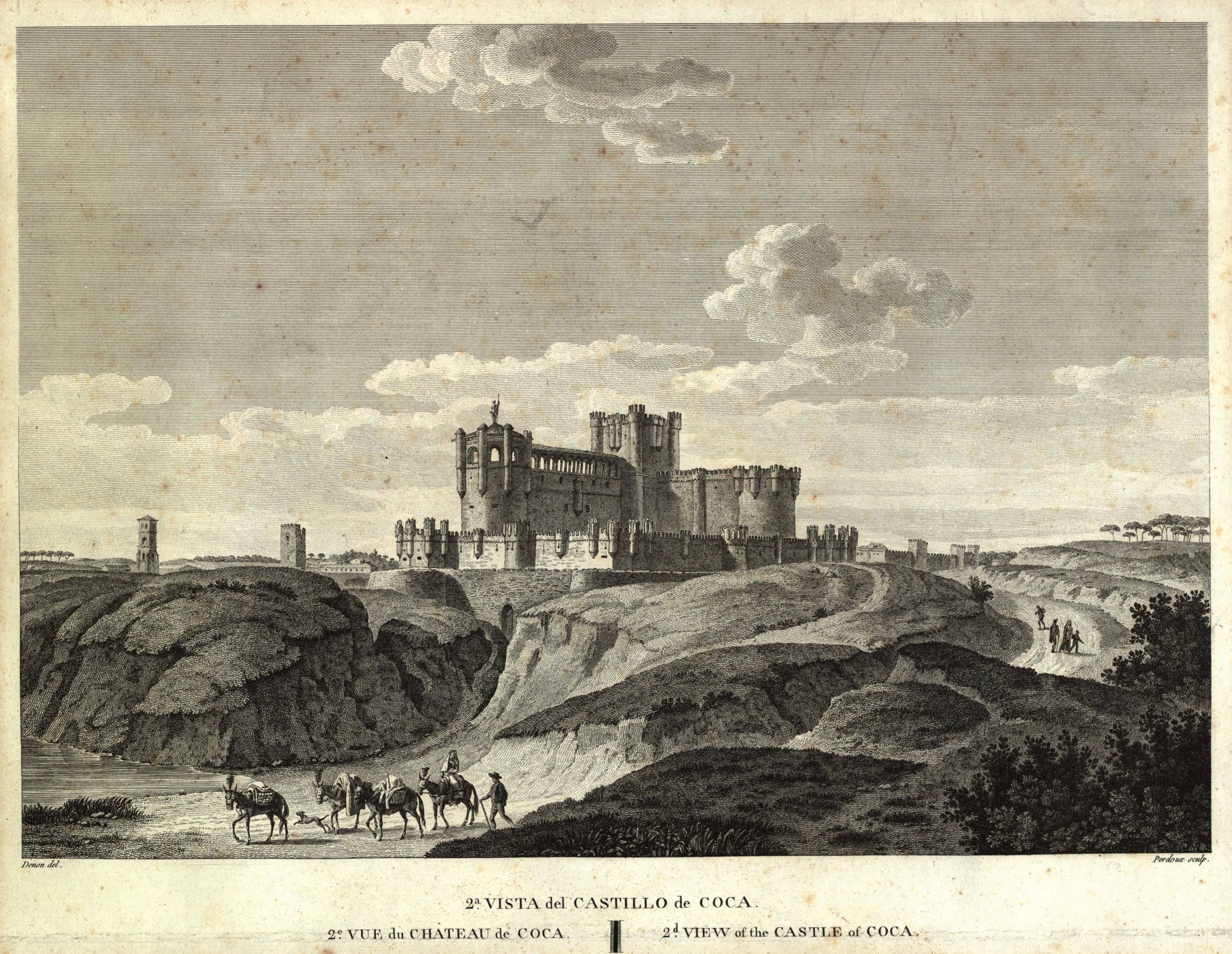 Castillo de Coca